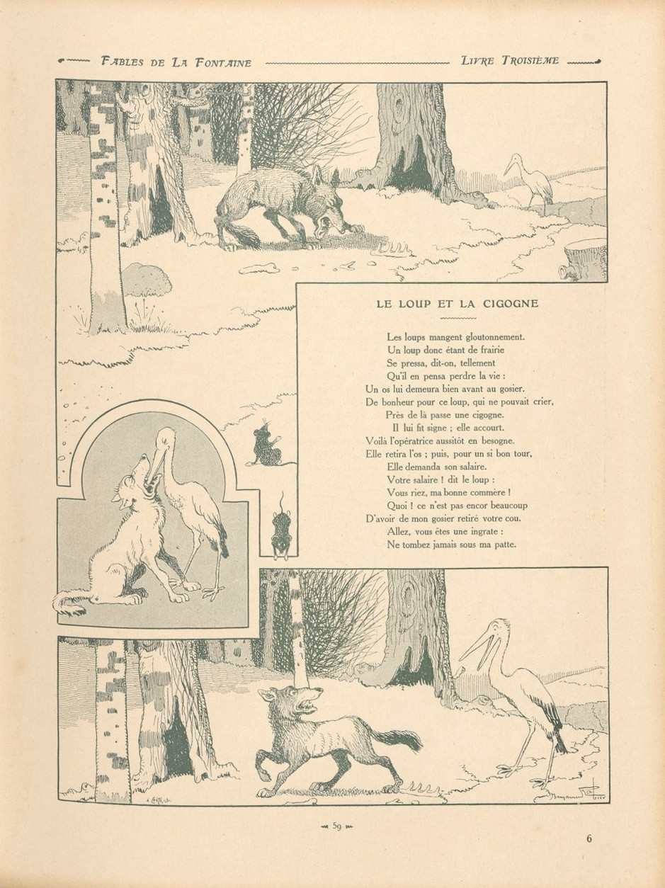 Fables de La Fontaine illustrées par Benjamin Rabier : Le loup et la cigogne.